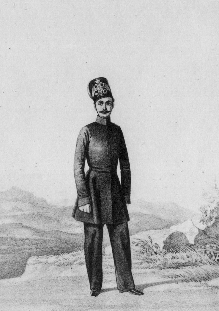 Денщик Гвардейских Казачьих войск, 1852-1855.